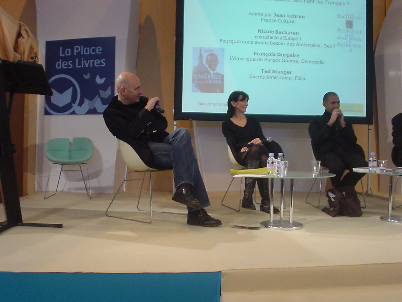 Jean Lebrun au salon du livre le 16 mars 2008 à Paris (porte de Versailles), dirigeant une émission en public et sur France Culture.